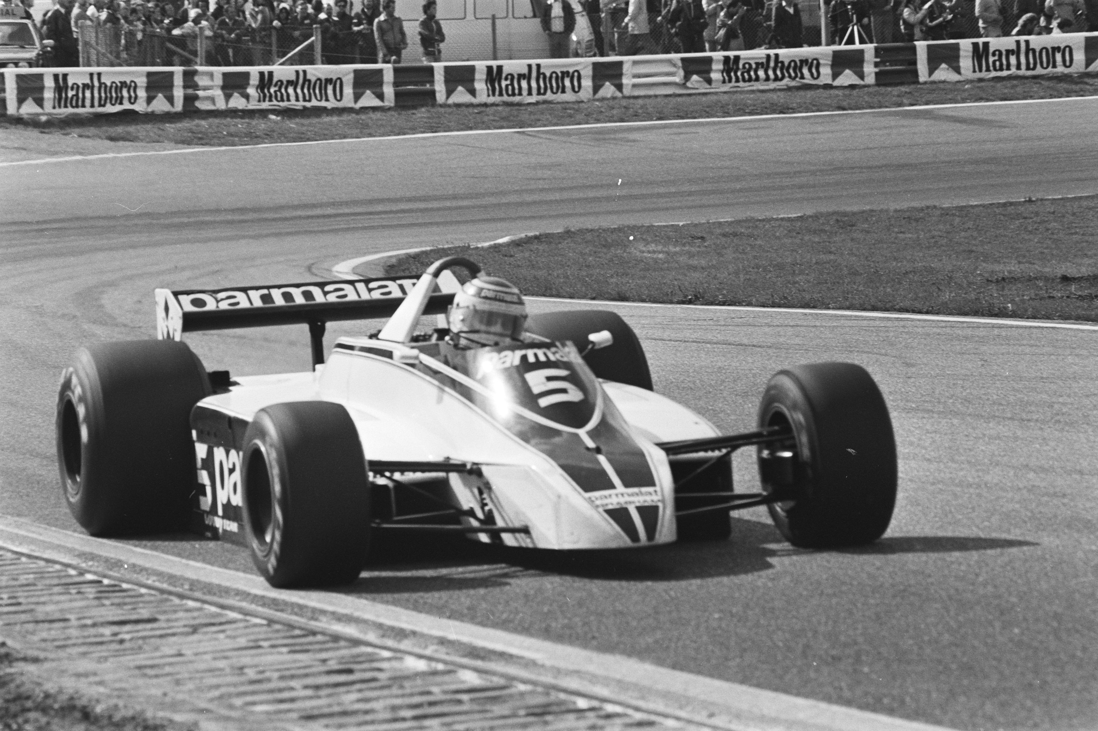 Winnaar Nelson Piquet in aktie.